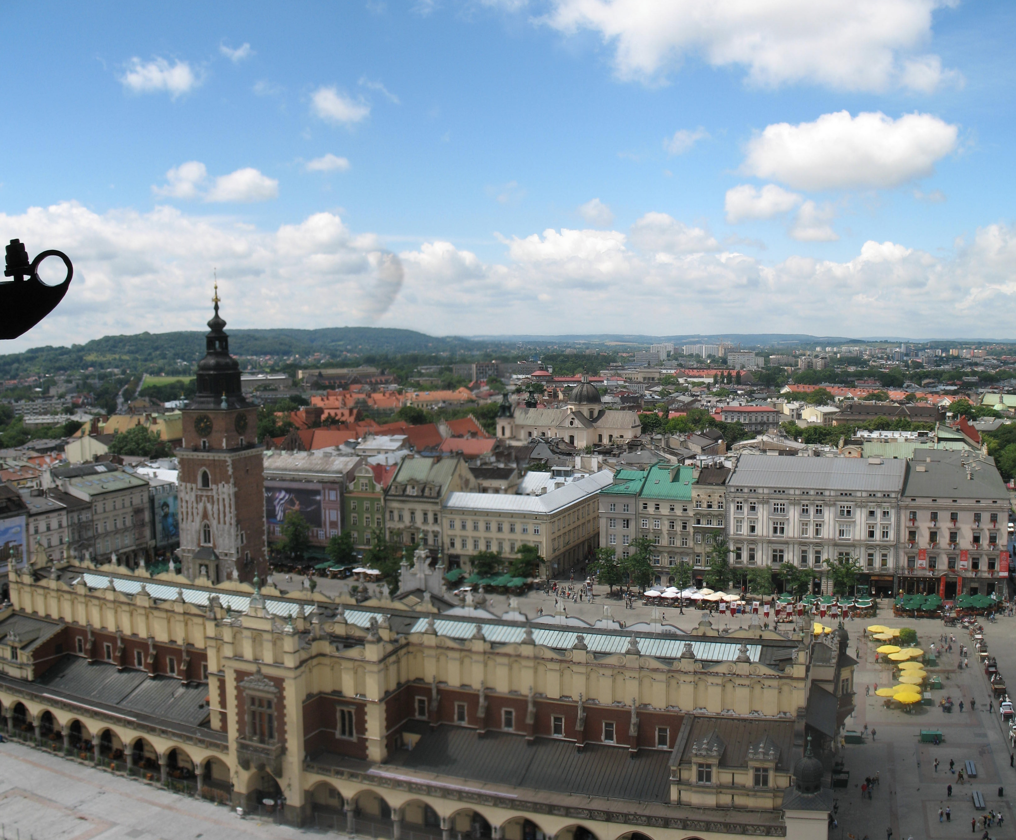 St. Mary in Kraków, Poland